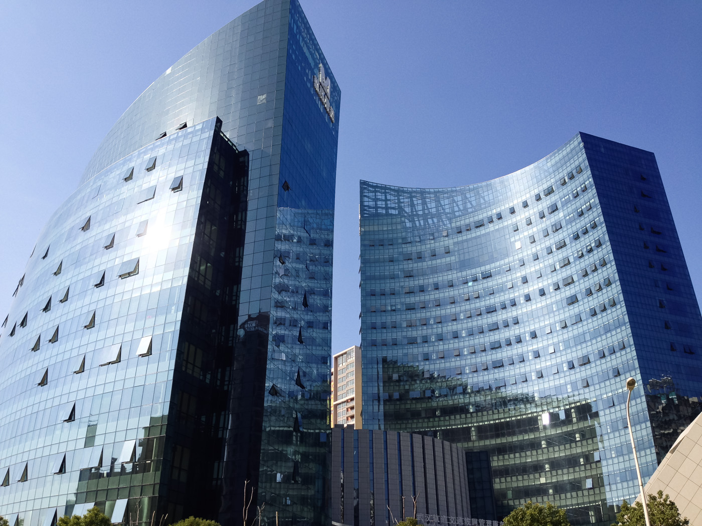 中文（中国大陆）: 武汉轨道交通线网服务管理中心